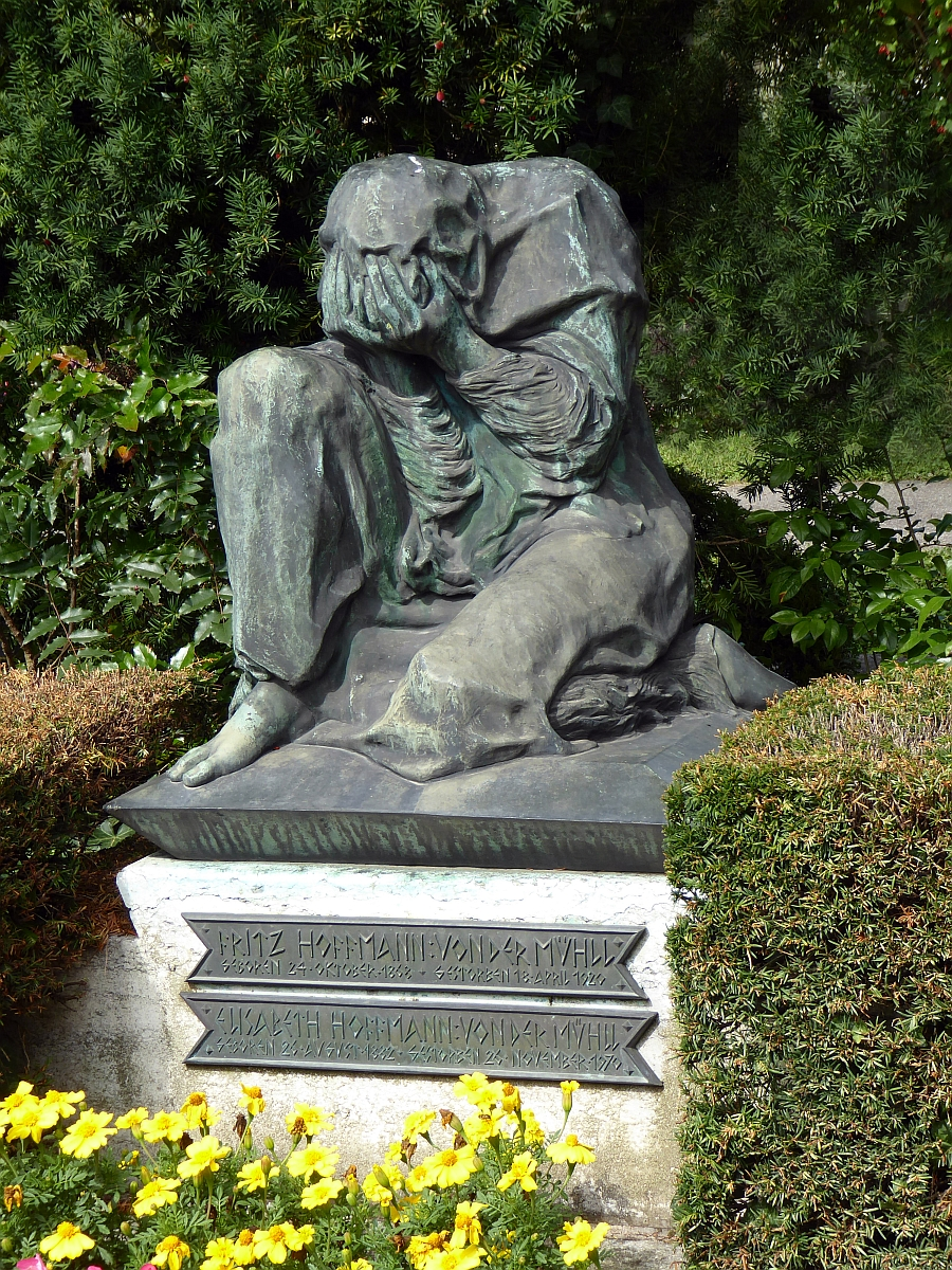 Fritz Hoffmann-La Roche (von der Mühll) (1868-1920), Grab auf dem Friedhof Wolfgottesacker, Basel